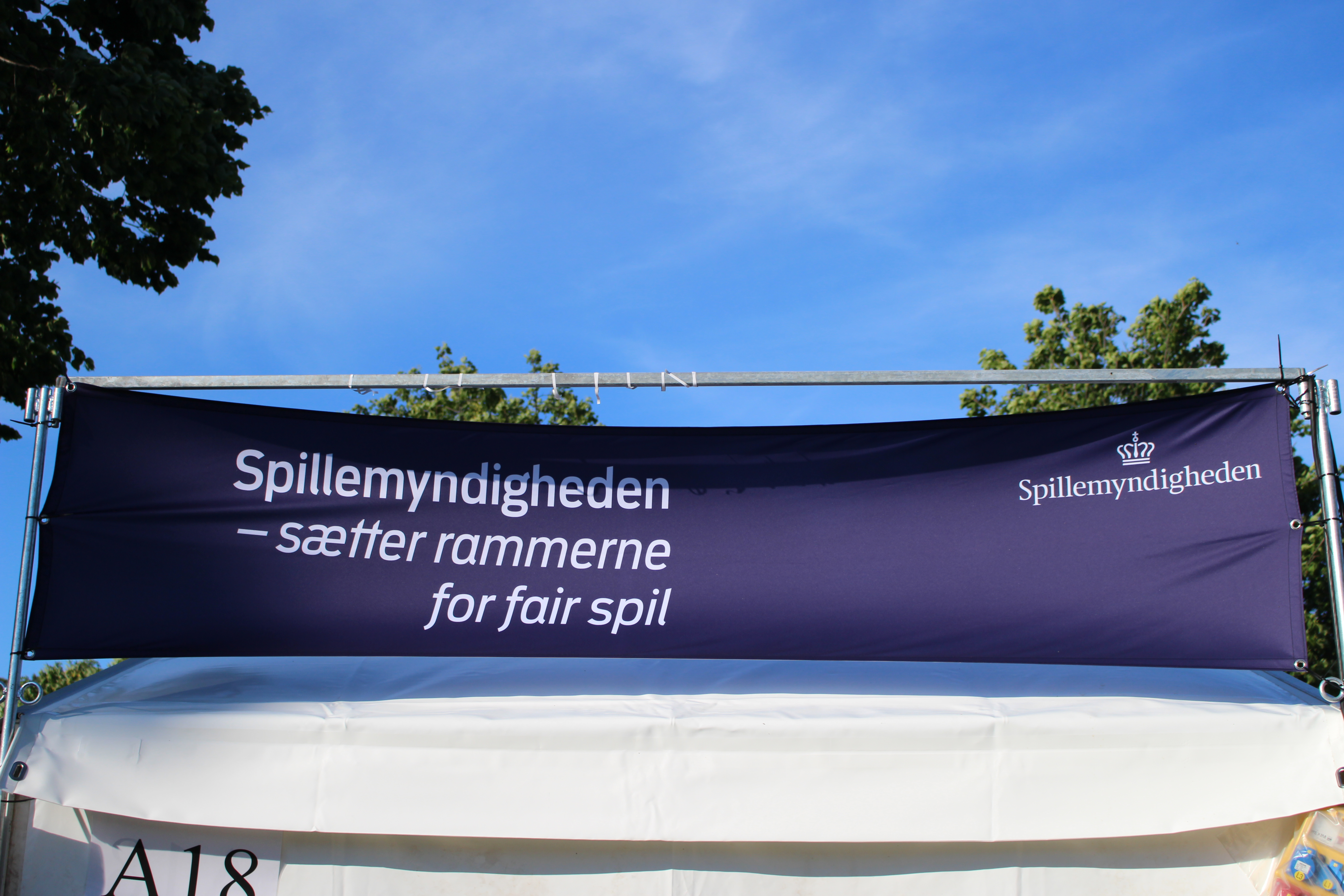 Organisationen Spillemyndigheden's banner på teltet på Folkemødet 2016.